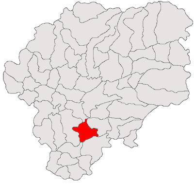 Categorie:Hărţi ale judeţului Bistriţa-Năsăud